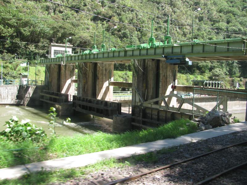 Dam on urubamba river